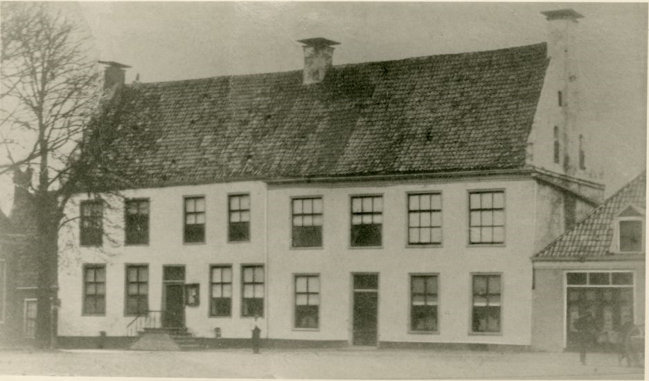 Het Dekemahuis uit circa 1500 in Franeker. Het rechter deel is rond 1900 afgebroken.